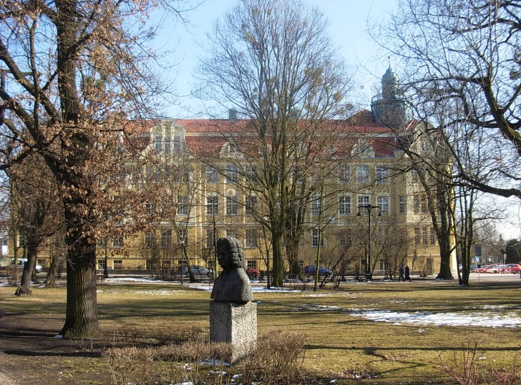 Park Jana Kochanowskiego w Bydgoszczy